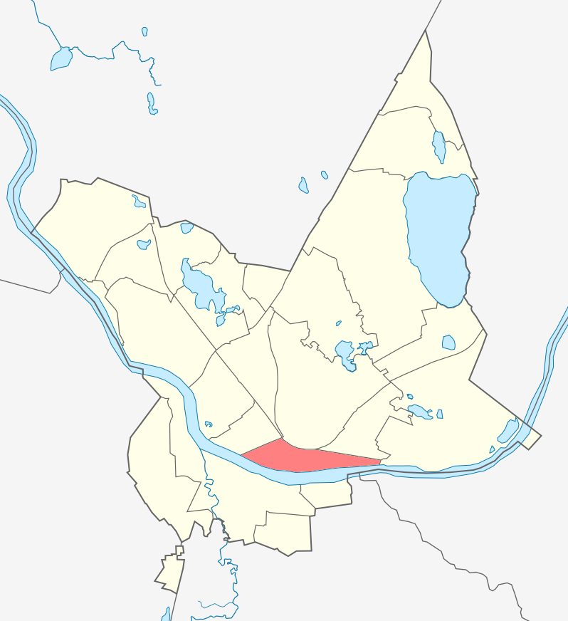 Микрорайон Гаёк карте Даугавпилса.